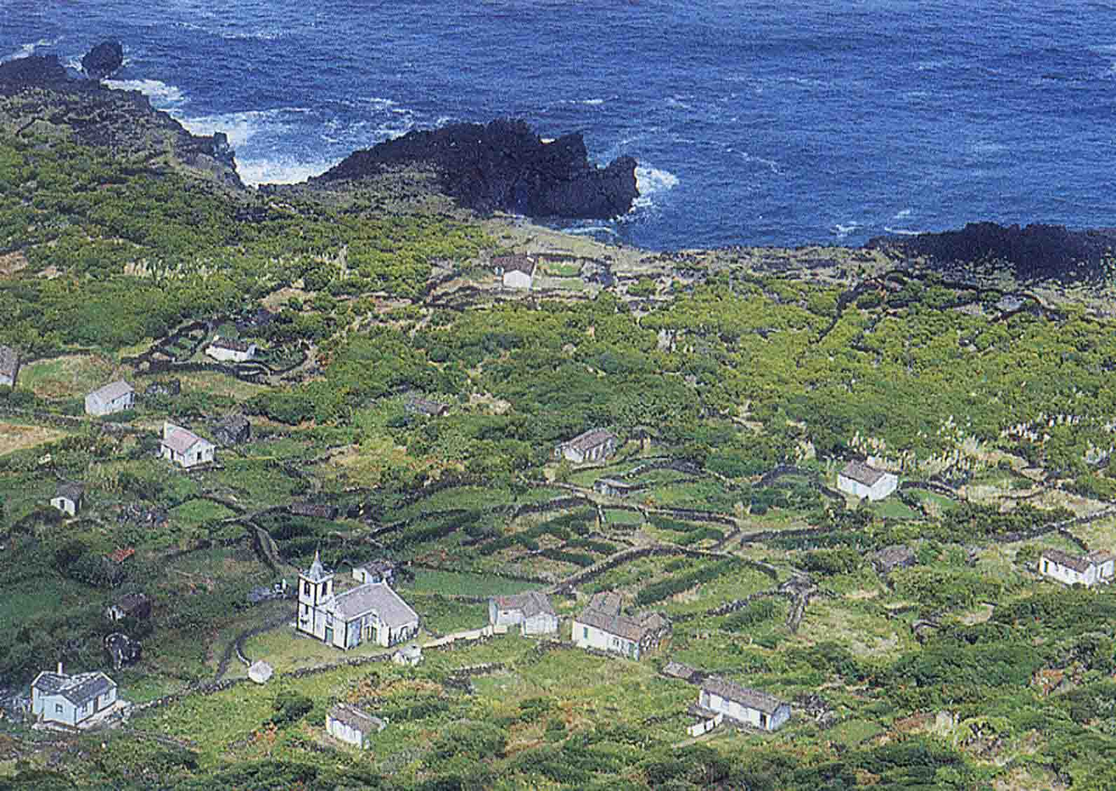 Fajã da Ribeira da Areia, ilha de São Jorge, Açores, Portugal.